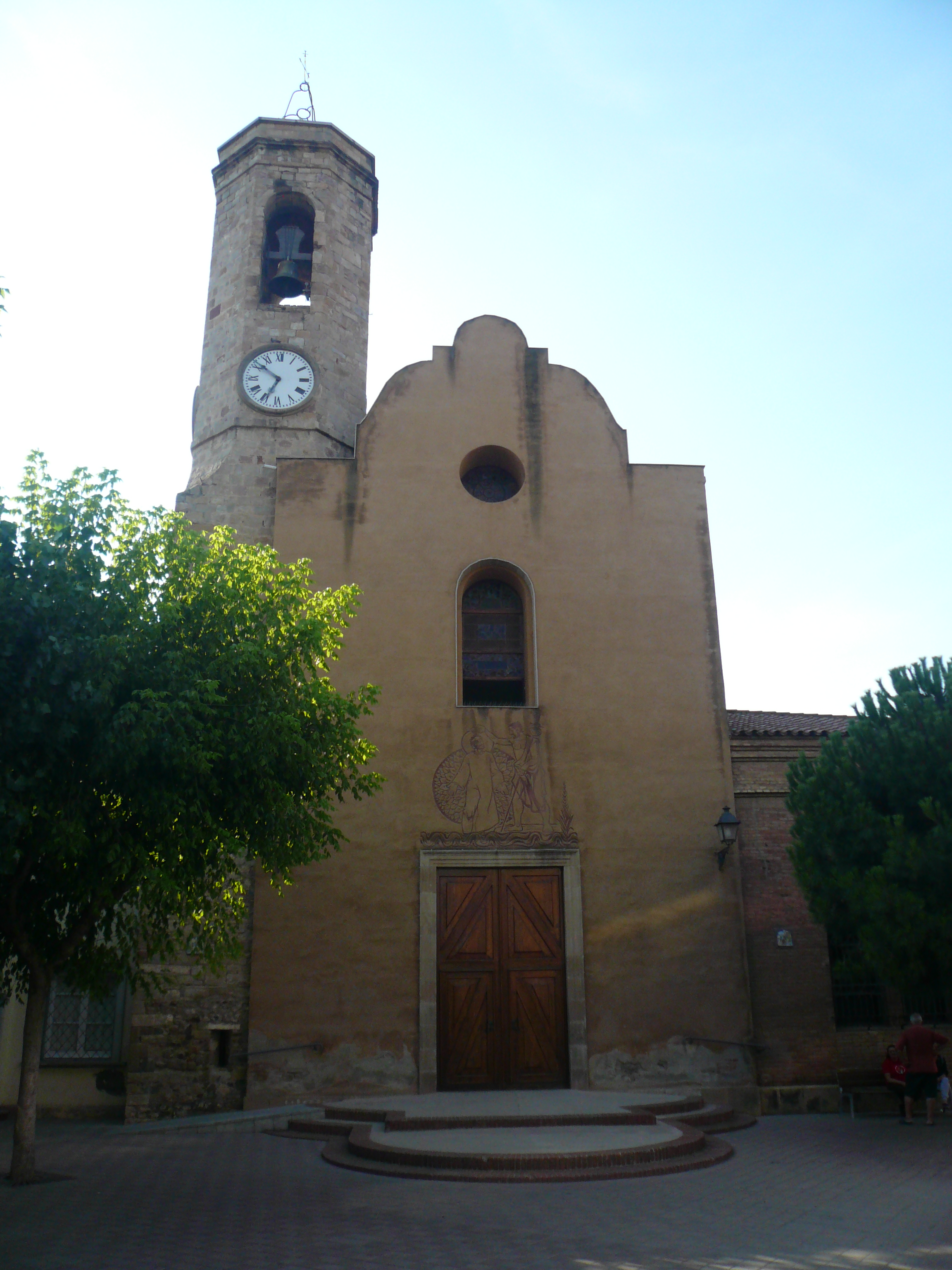 Església parroquial de Sant Joan Baptista. C. Catalunya (Santa Oliva) (Sant Joan Despí). Object location41° 22′ 01.95″ N, 2° 03′ 21.34″ E